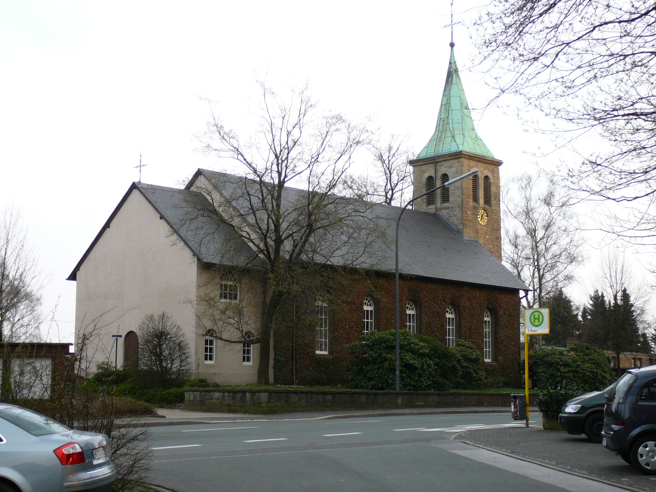 Höhenstraße, Wuppertal